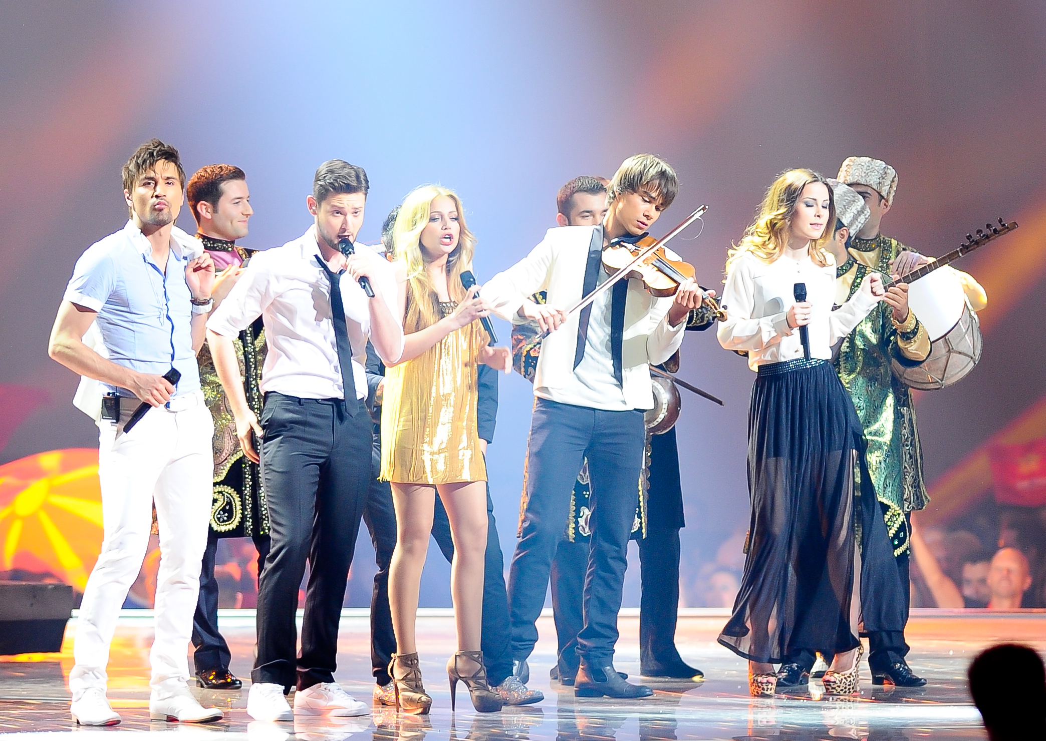 Победители прошлых лет в Баку